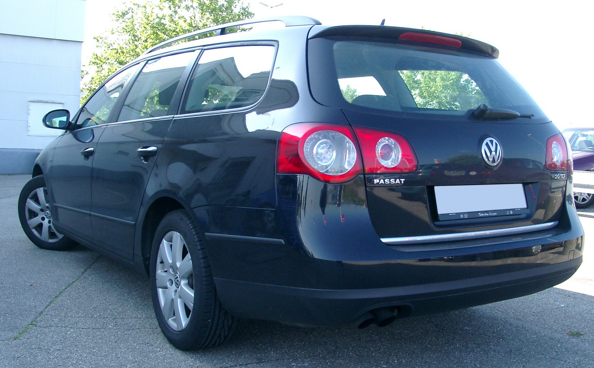 Volkswagen Passat Kombi, Typ B6